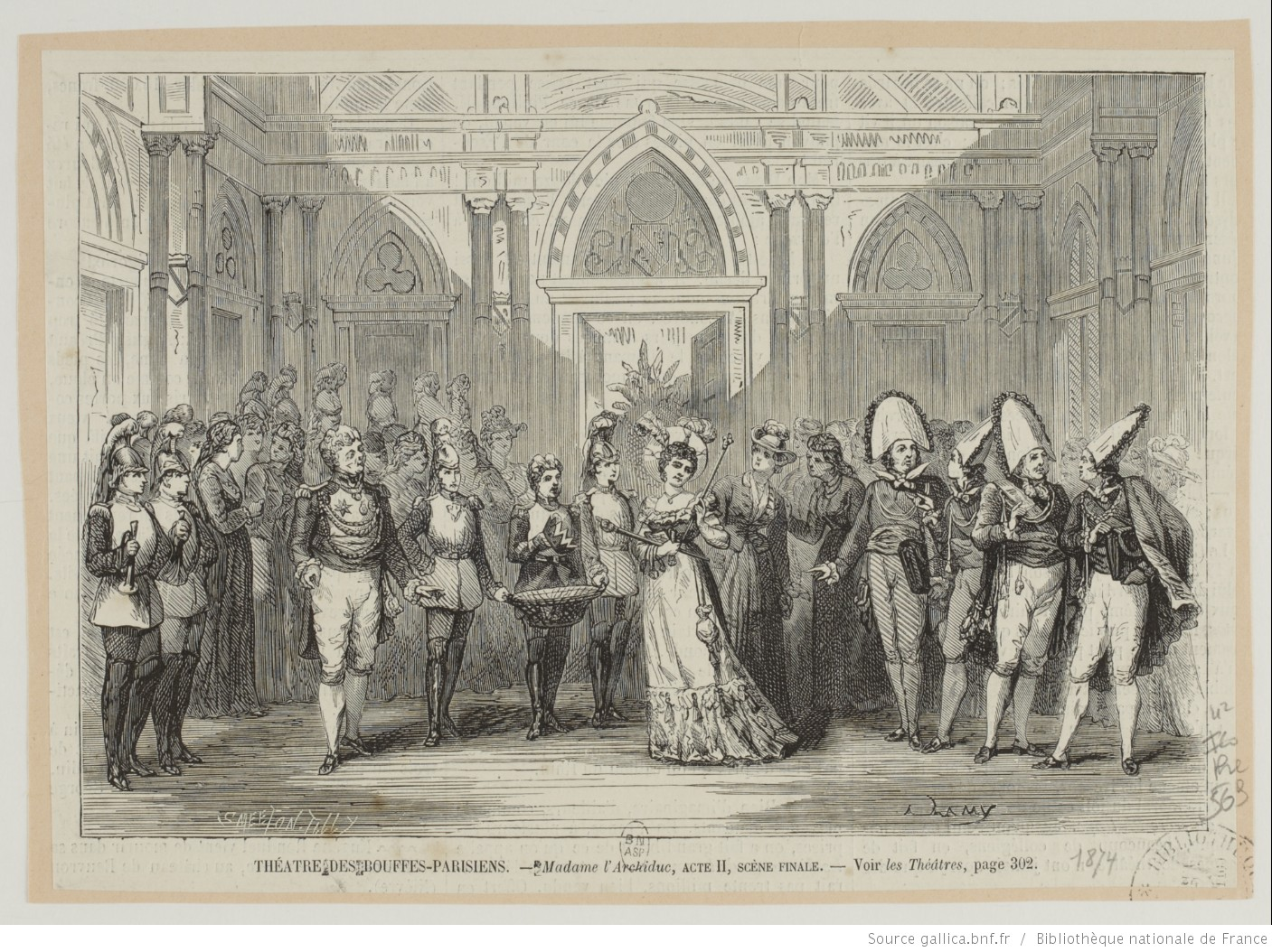 Illustration de presse de l'acte 2 (scène finale) de Madame l'archiduc, l'opéra-bouffe de Jacques Offenbach et Millaud